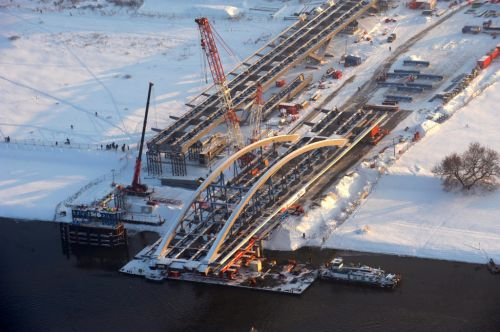 Dresden 18.12.2010 Winterlich verschneites Einschwimmen der Waldschlösschenbrücke in Dresden über die Elbe mit den Stahlträgern der belgischen Firma Victor Buyck Steel Constructions nach Vorgaben des Büros AWB Architekten Architekturbüro Bauer BDA und Bauleistungen der EUROVIA Beton GmbH. View the construction site of Waldschlösschen bridge over the Elbe in Dresden / Saxony. Foto: euroluftbild.de / ZB / Matthias Hiekel